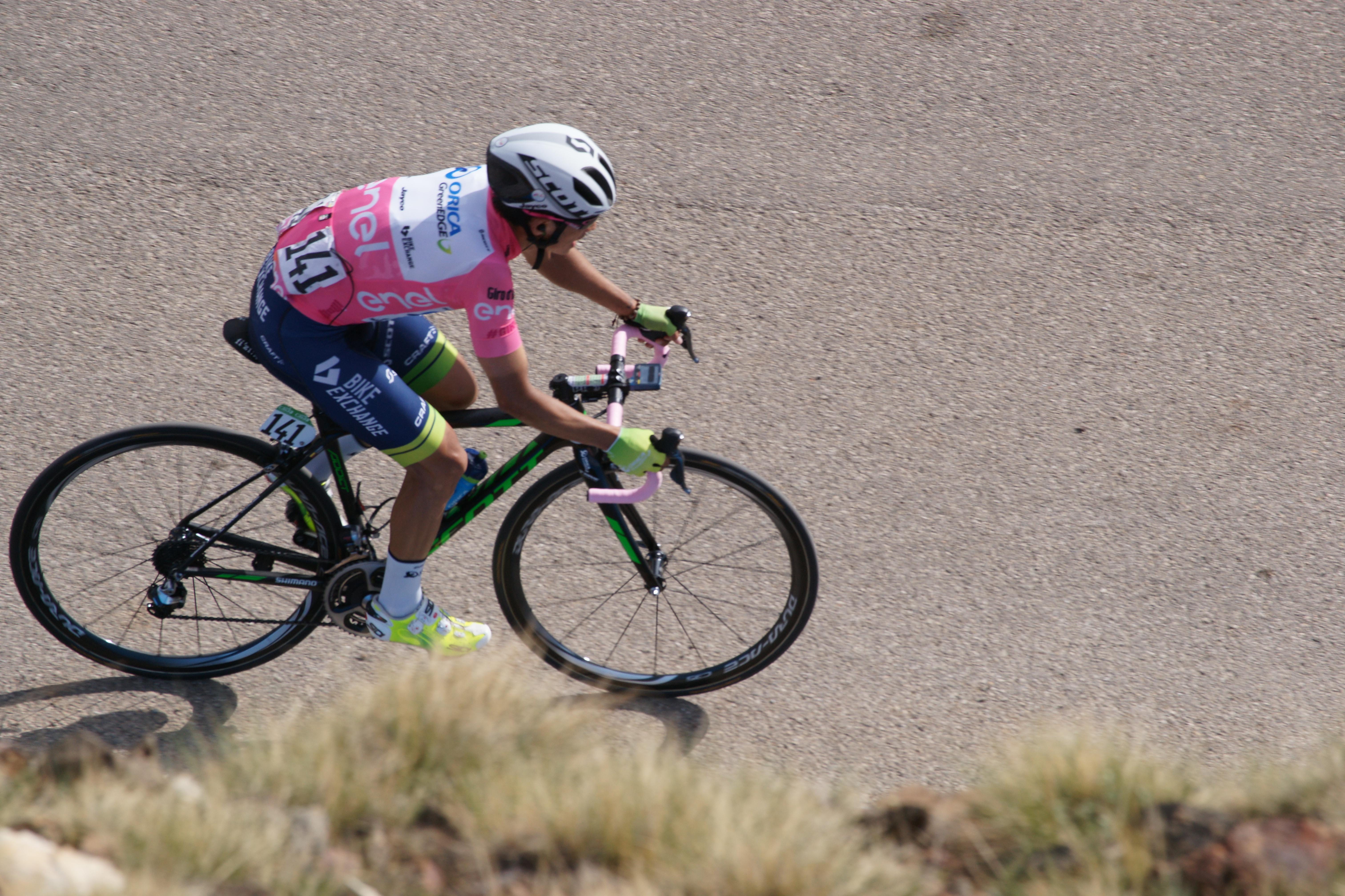 Esteban Chaves, étape 20 col de la Lombarde Giro 2016